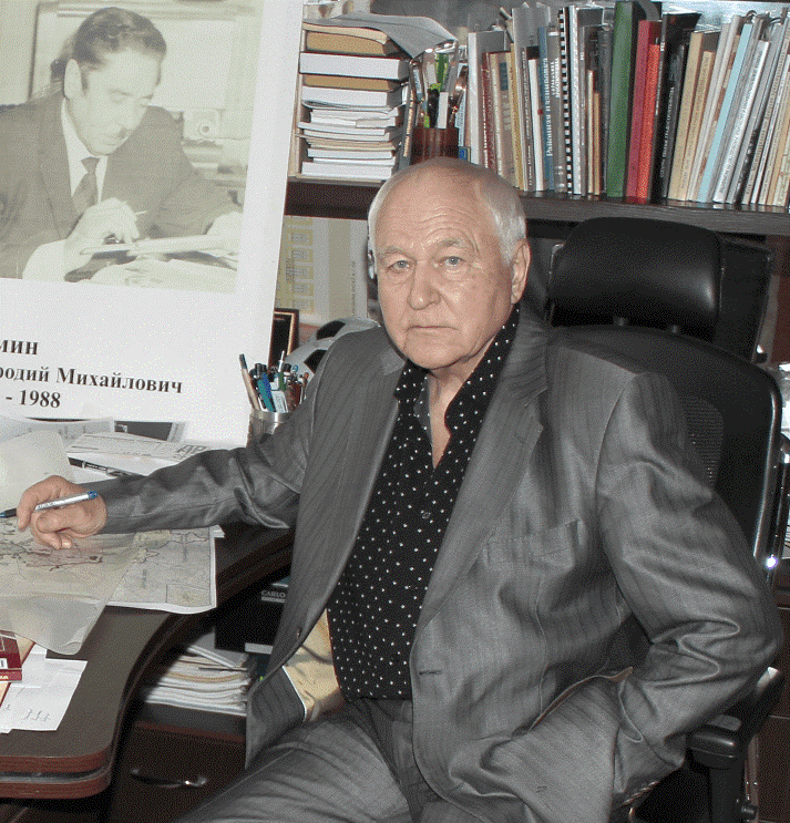 Николай Мефодиевич Дёмин в своем домашнем кабинете. (Фотография из книги «Архитектор Иосиф Каракис. — Нью-Йорк: Алмаз, 2016. — С. 14.»)